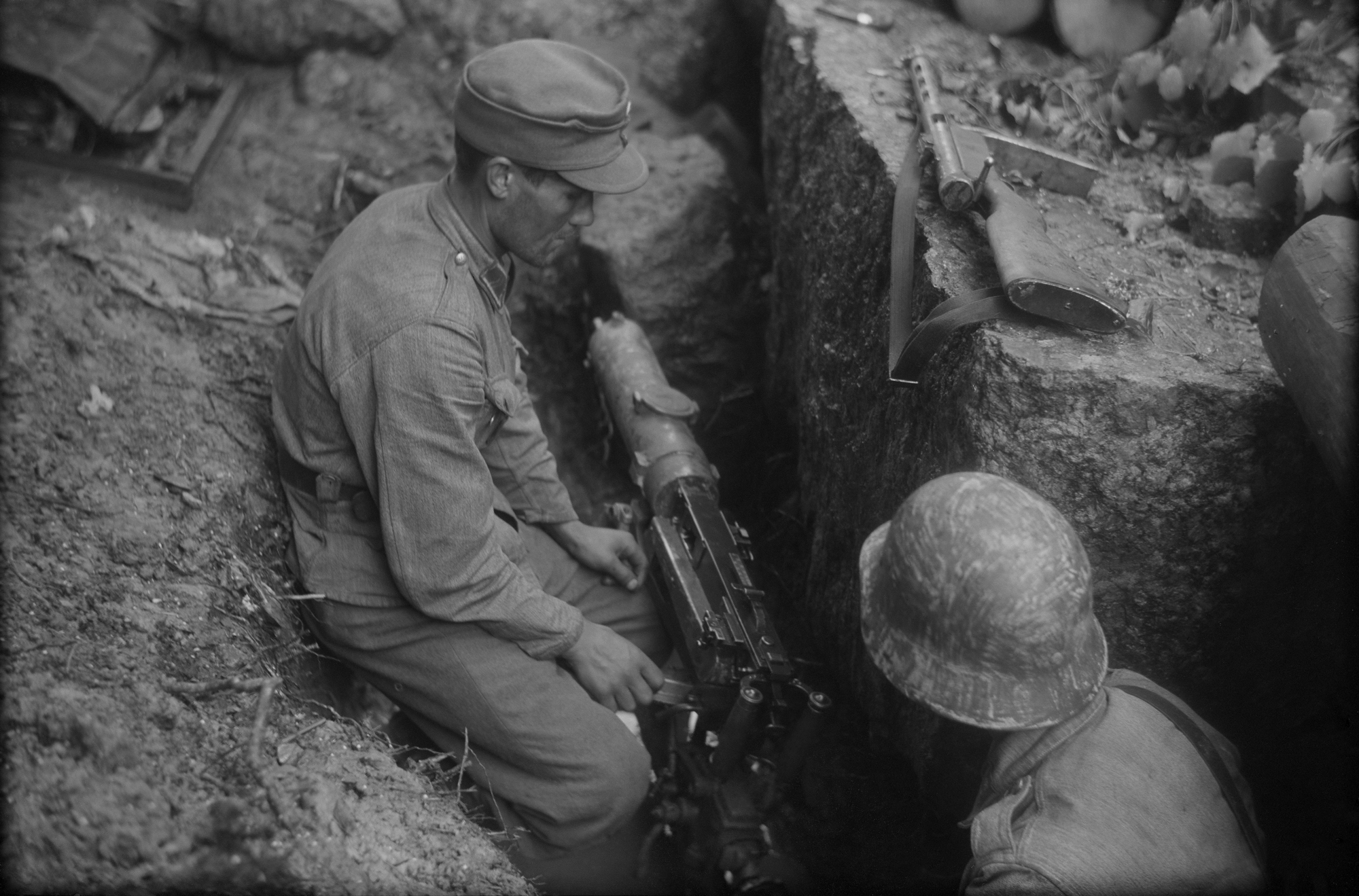 Konekivääri on vedetty suojaan, josta se saadaan nopeasti tuliasemaan. Tienhaara 1944.06.25